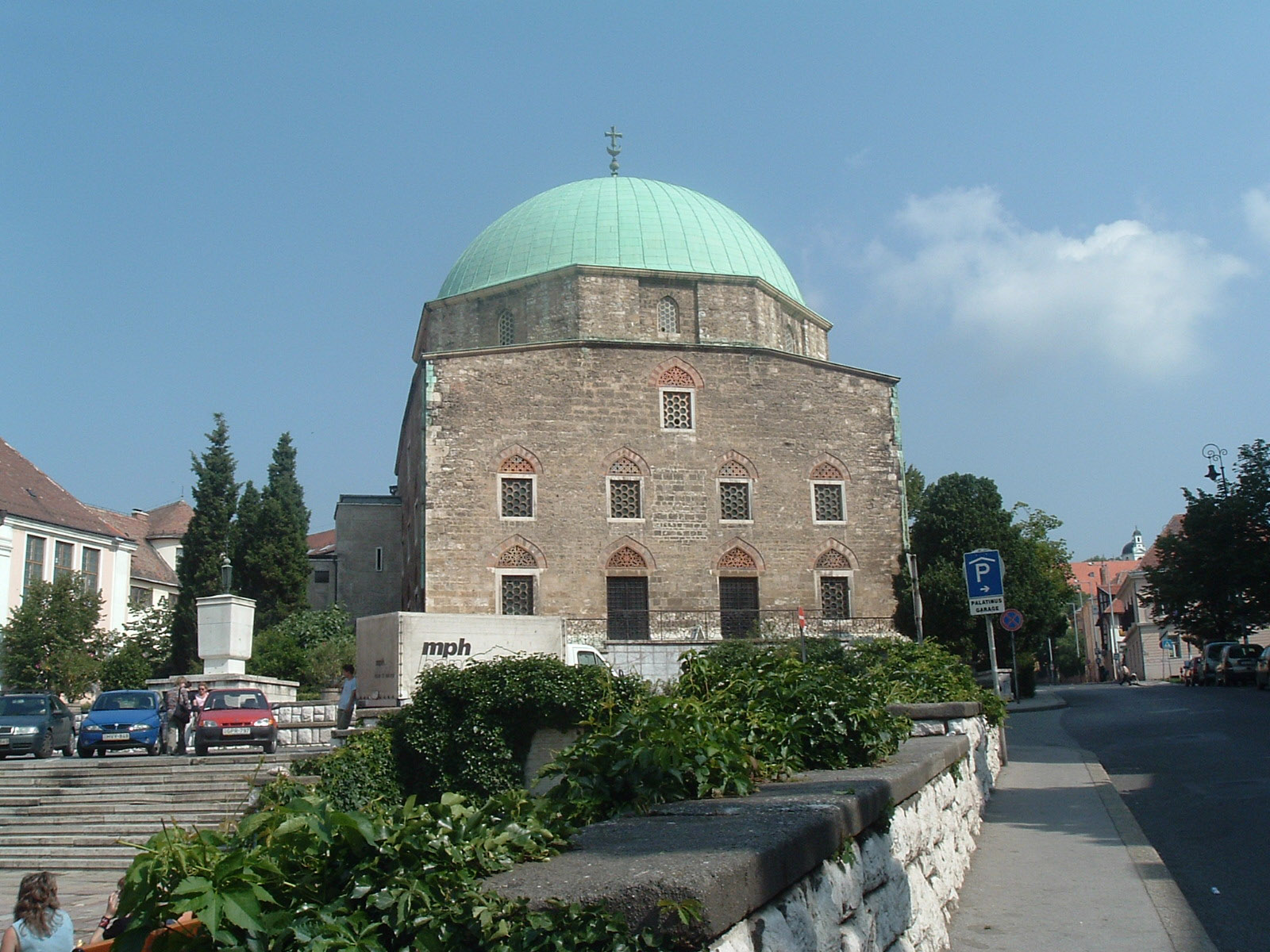 Pécs